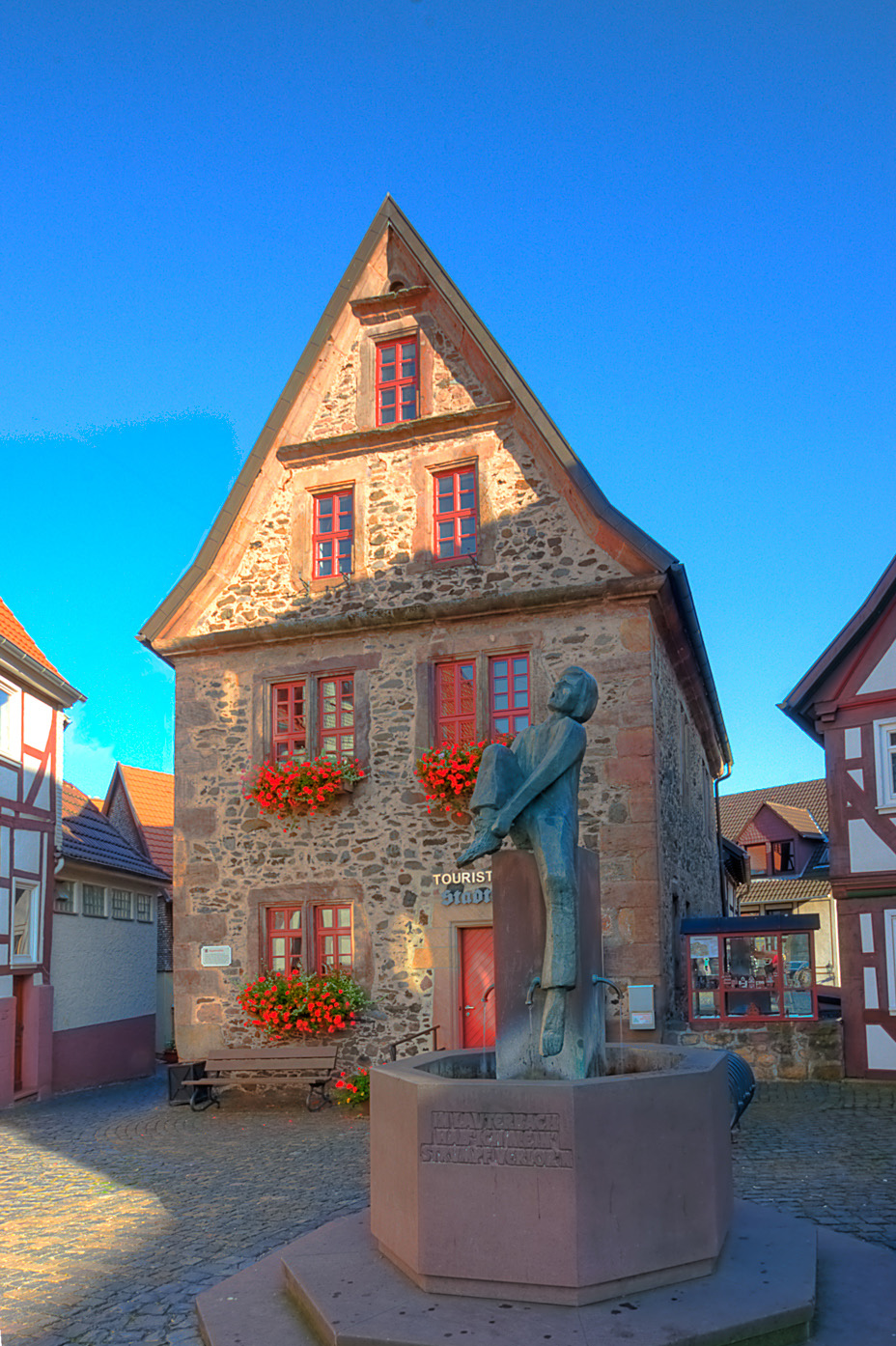 Das Gebäude ist die erstmals 1398 urkundlich erwähnte Stadtmühle in Lauterbach, heute Sitz des Lauterbacher Touristik-Centers. Davor das Denkmal für das dem Volkslied: "In Lauterbach hab' ich mein' Strumpf verlor'n..." entnommene und der Stadt Lauterbach zugeschriebene Zitat. Gestaltet von Professor Knud Knudsen.